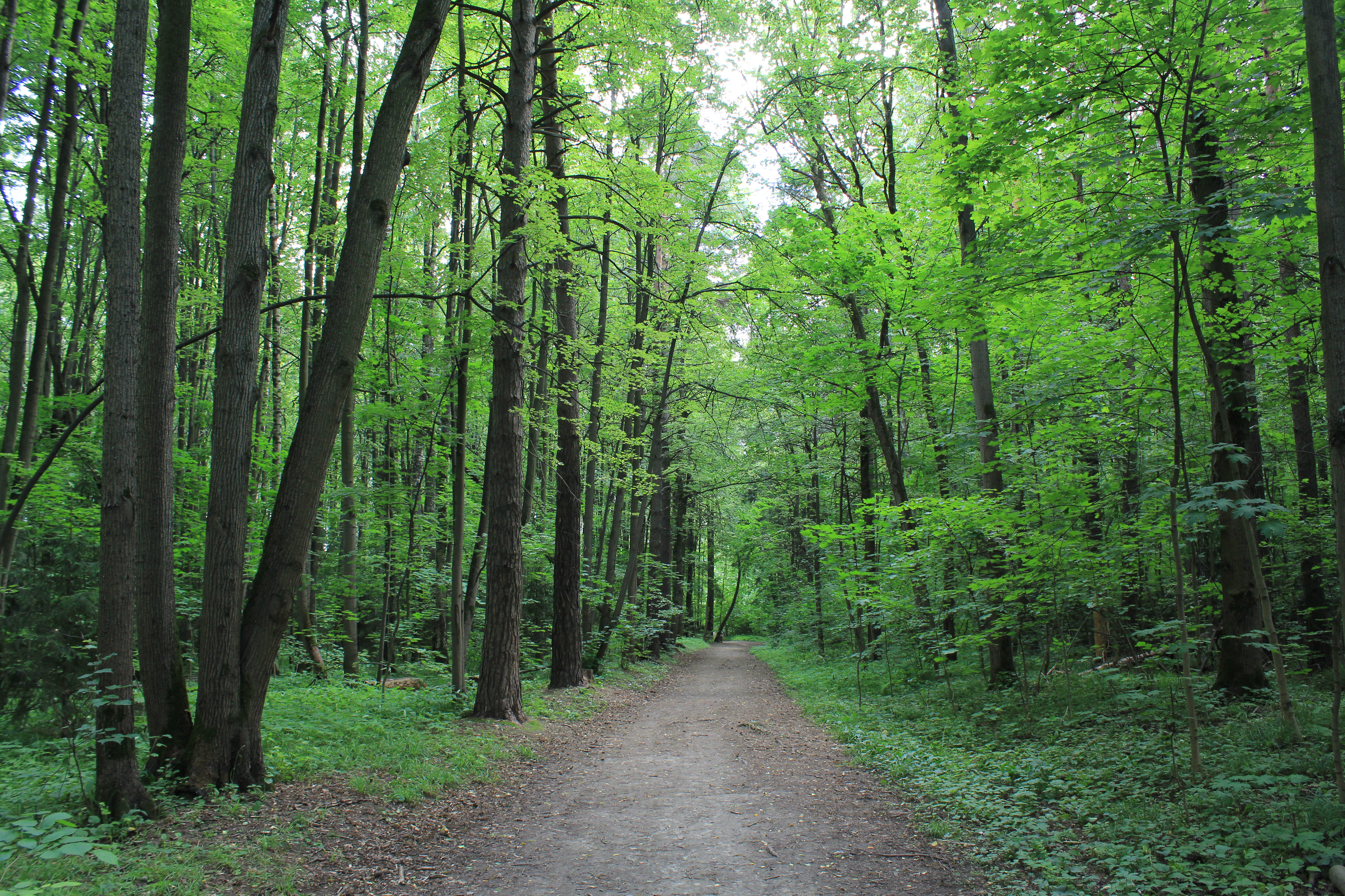 В Битцевском лесу